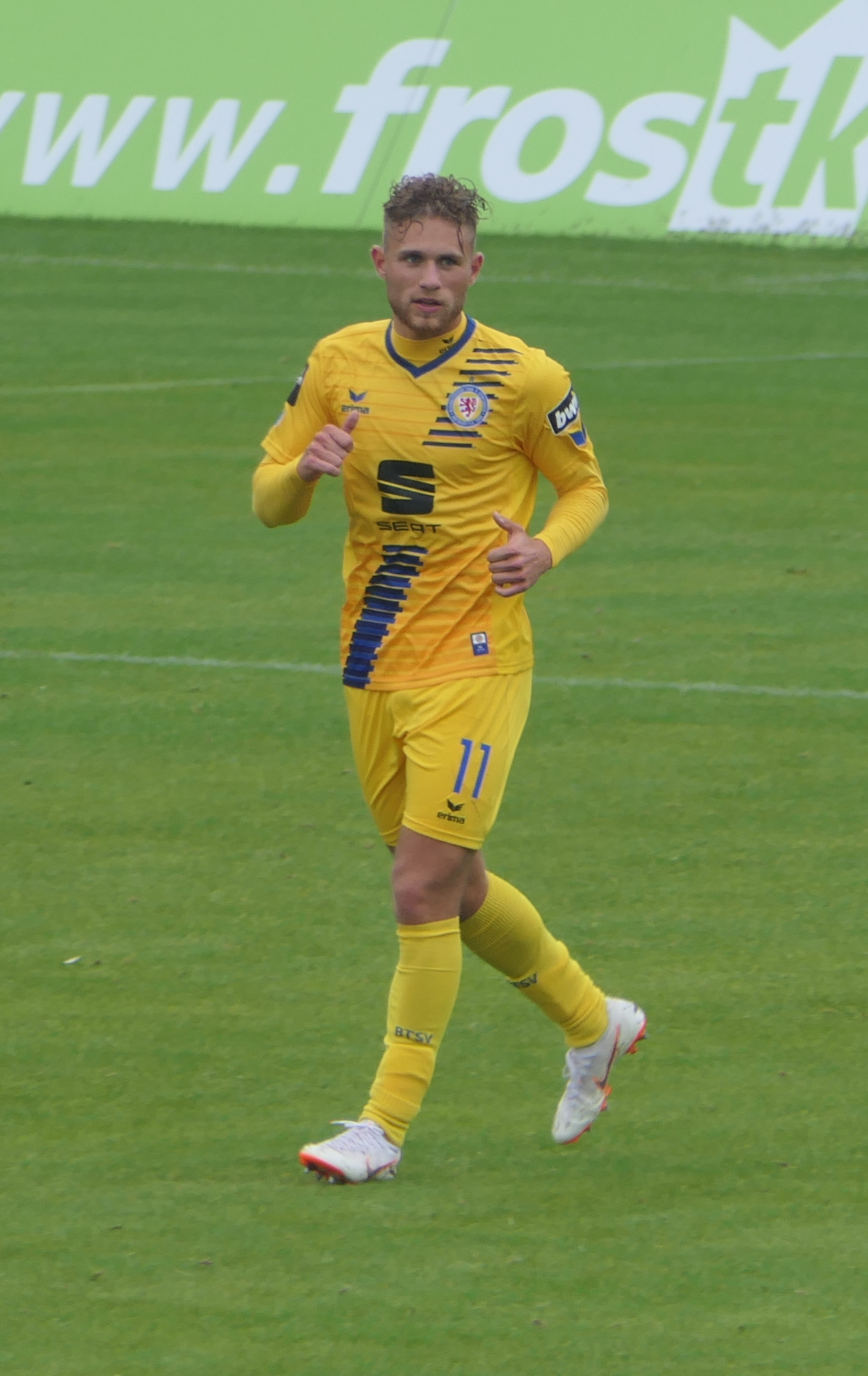 Der Fussballprofi Leandro Putaro im Trikot von Eintracht Braunschweig beim Auswärtsspiel bei der SpVgg Unterhaching am 01.09.2018.